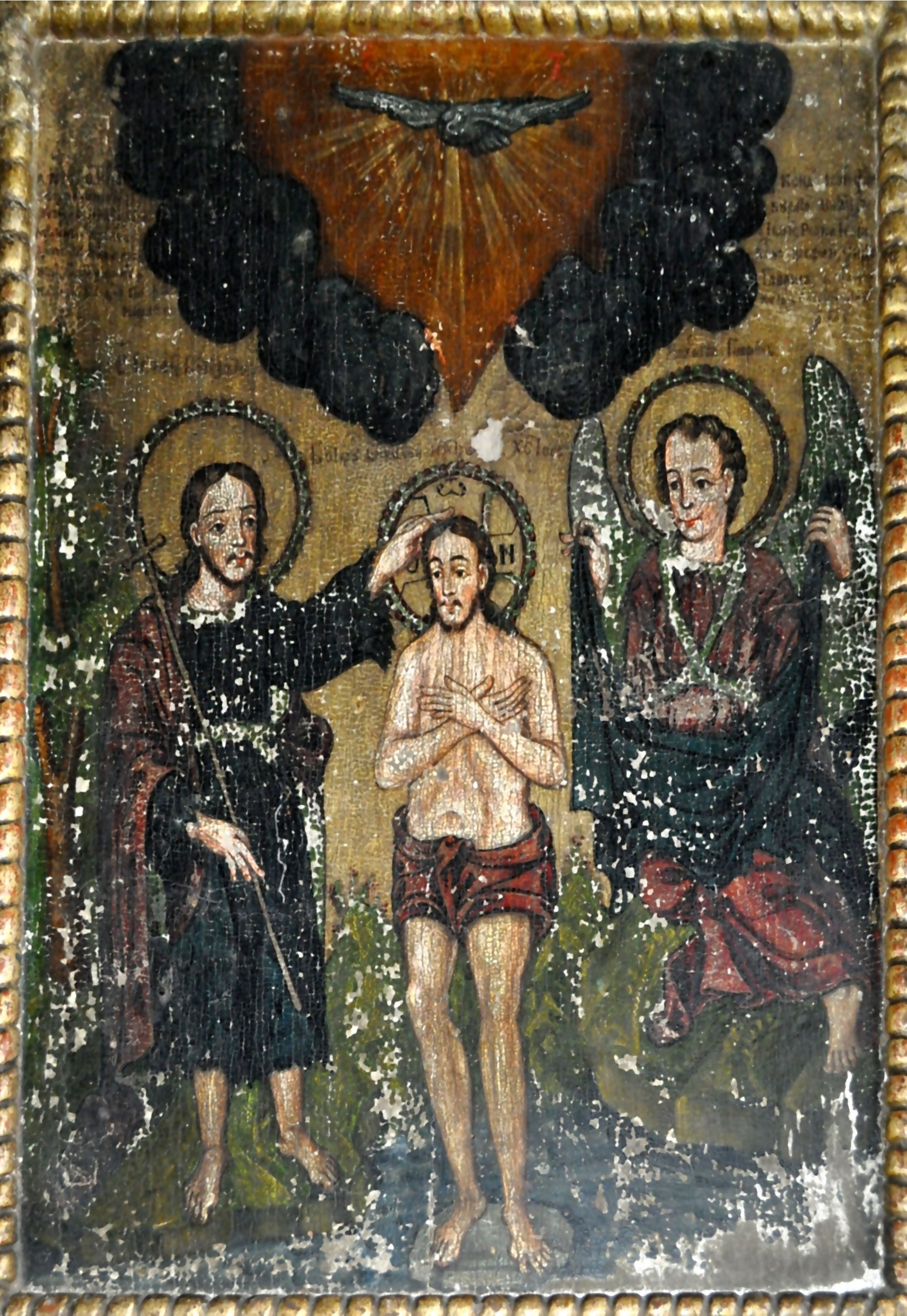 Biserica din Mănăstireni, județul Cluj (icoanele de patrimoniu)